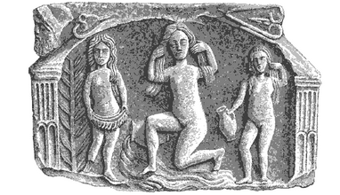 Römisches Relief die die badende Venus und zwei Nymphen darstellt. Es basiert auf einem Bildwerk der Aphrodite des Griechen Diodalsas, geschaffen im vierten Jahrhundert v. Chr. Die Nymphen halten einen Wasserkrug und ein Tuch in den Händen während Venus ihr Haar wäscht. Es stammt aus dem zweiten oder dritten Jahrhundert, gefunden 1852 in High Rochester (GB).